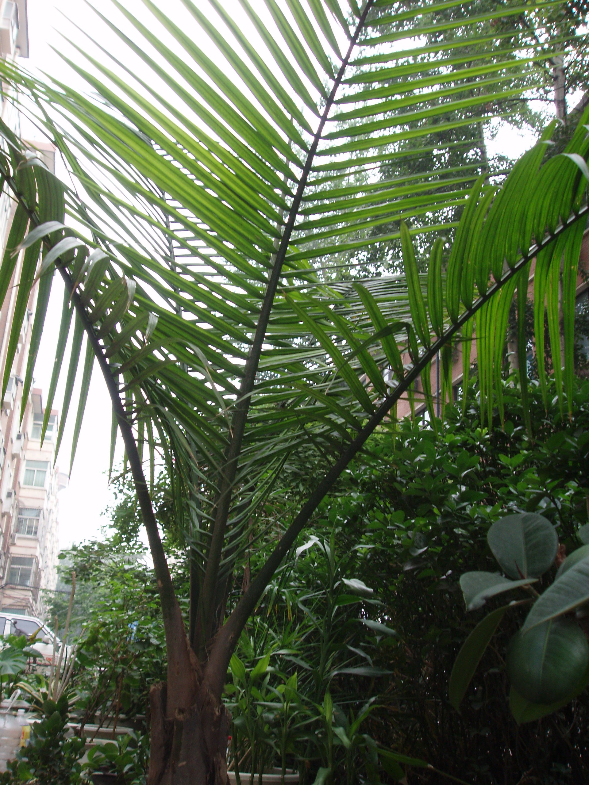 Chamaedorea elegans (syn. Collinia elegans)